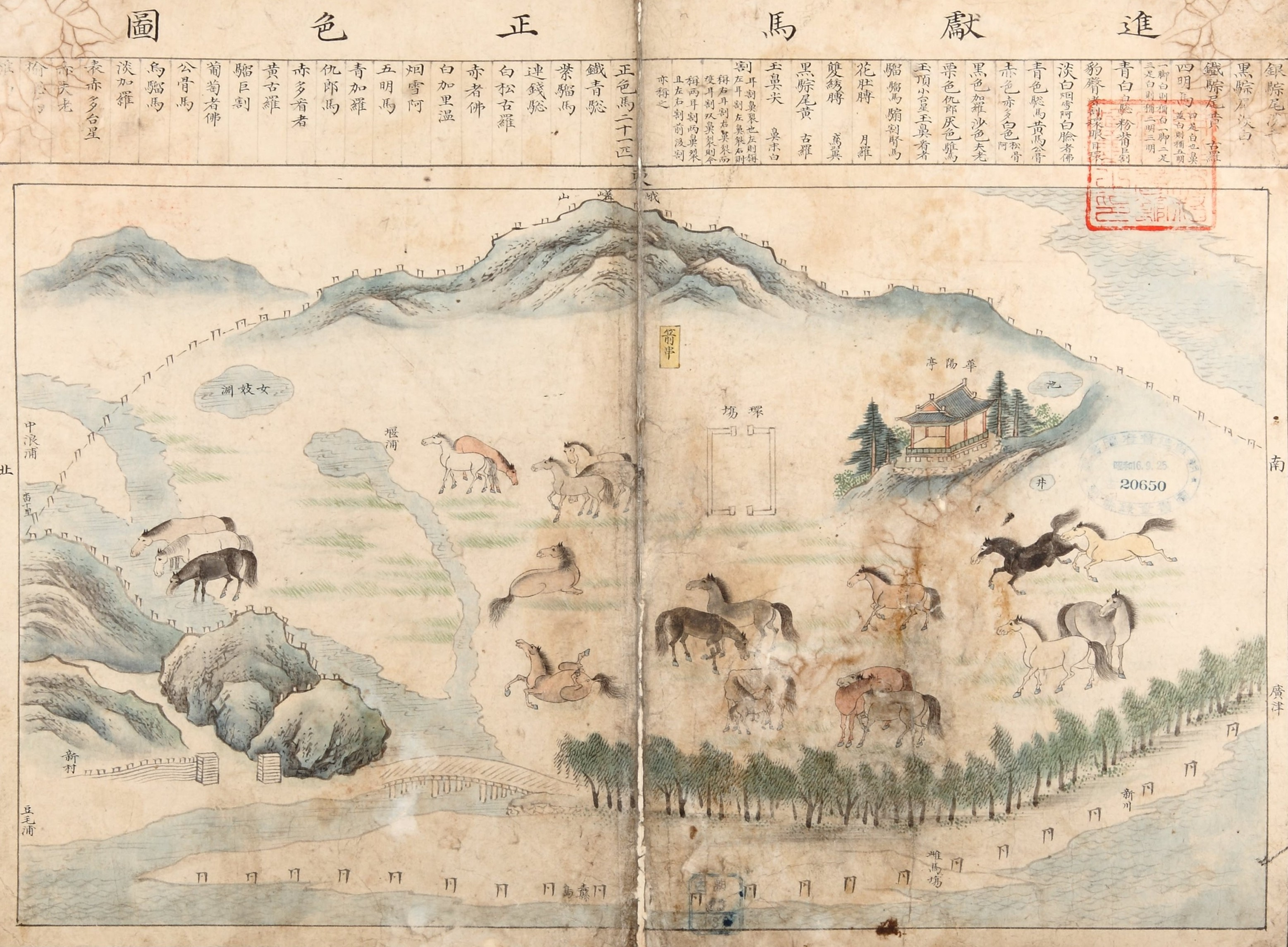 1678년에 전국에 분포하는 목장을 그린 필사본 채색지도첩이다. 1권 42면으로 구성된 이 지도첩은 모두 3장으로 구성되었다. 첫 장에는 진헌마정색도(進獻馬正色圖), 두 번째 장에는 도군별 목장상황을 담은 회화식 지도, 세 번째 장에는 이 지도첩의 제작 동기와 시기를 알려주는 허목(許穆)의 기문(記文)이 실려 있다. 허목은 당시 사복시의 제조였는데, 그 이전에 작성되었던 목장지도를 수정편찬하여 목장지도를 제작하게 하였다. 회화식 지도부분에는 전국의 목장 소재지를 지도에 그려넣고 소와 말, 목자(牧子)의 통계와 목장의 면적, 폐장된 목장의 상황 등을 기재하였다. 효종이 북벌계획(北伐計畵)을 추진함에 따라 군마(軍馬) 양육지로 전국의 초원지대와 도서 ·황무지 등에 목장을 확충하였는데, 이 지도첩은 그 위치와 크기, 상황을 시각적으로 기록한 것이다. 각 폭(幅), 각 면(面)마다 군명(郡名)과 이정표(里程表)를 기입한 이 국립중앙도서관 소장의 이 지도첩은 당시의 마정(馬政)과 목장에 관한 시책을 알 수 있는 귀중한 자료이다.